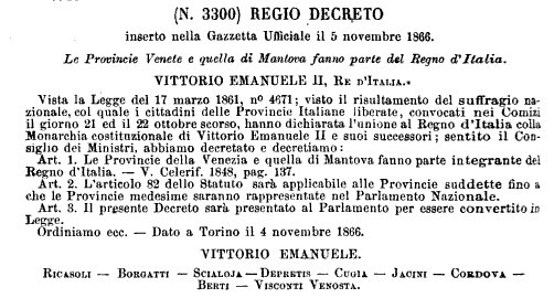 Testo del Regio Decreto 4 novembre 1866, n. 3300 relativo all'annessione delle provincie Venete e di quella di Mantova al Regno d'Italia